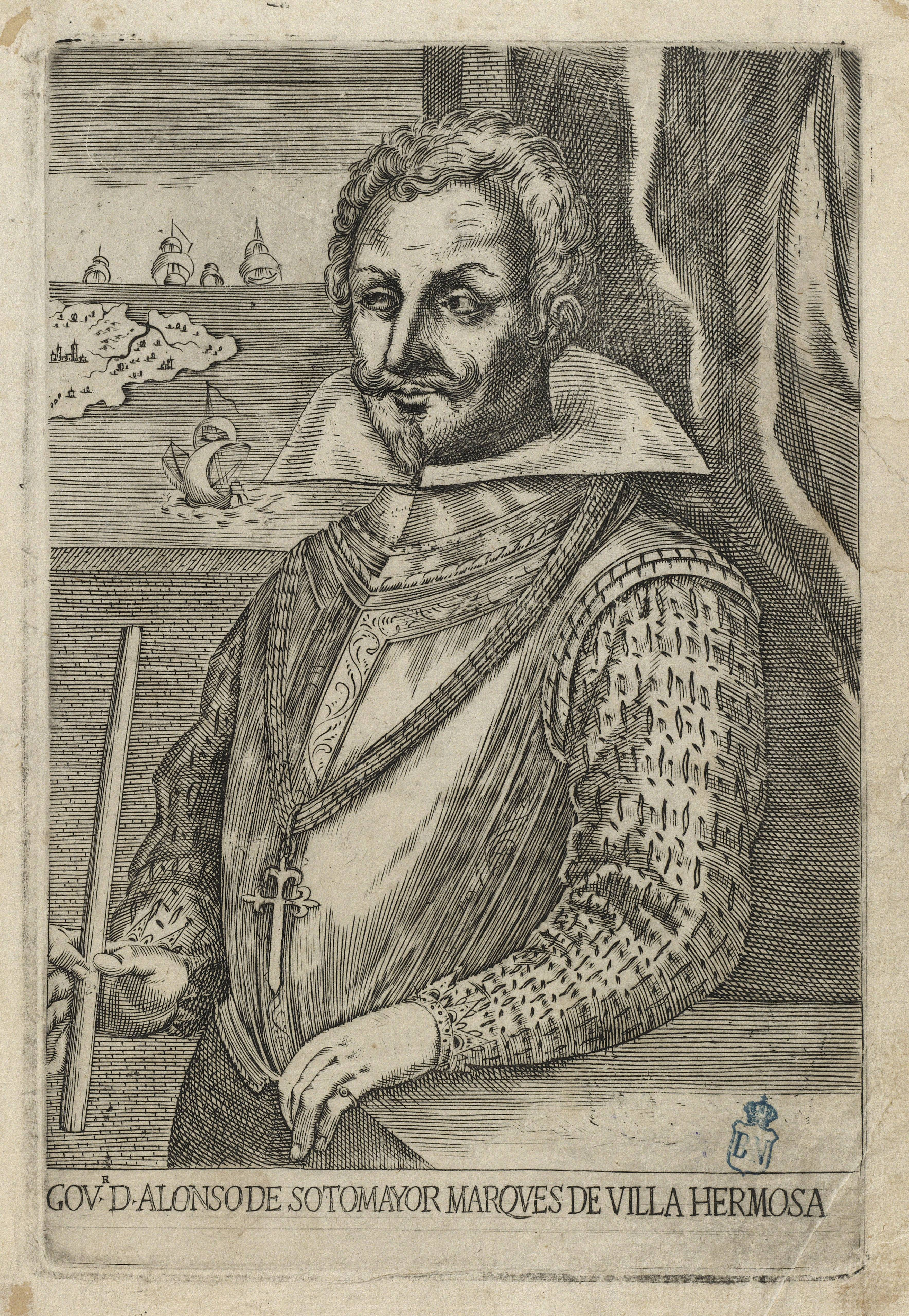 Alonso de Sotomayor, gobernador de Chile. Aguafuerte y buril